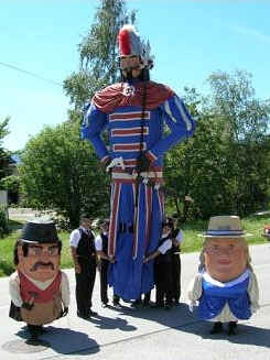 Giant Samson, St. Andrae Lungau, Austria